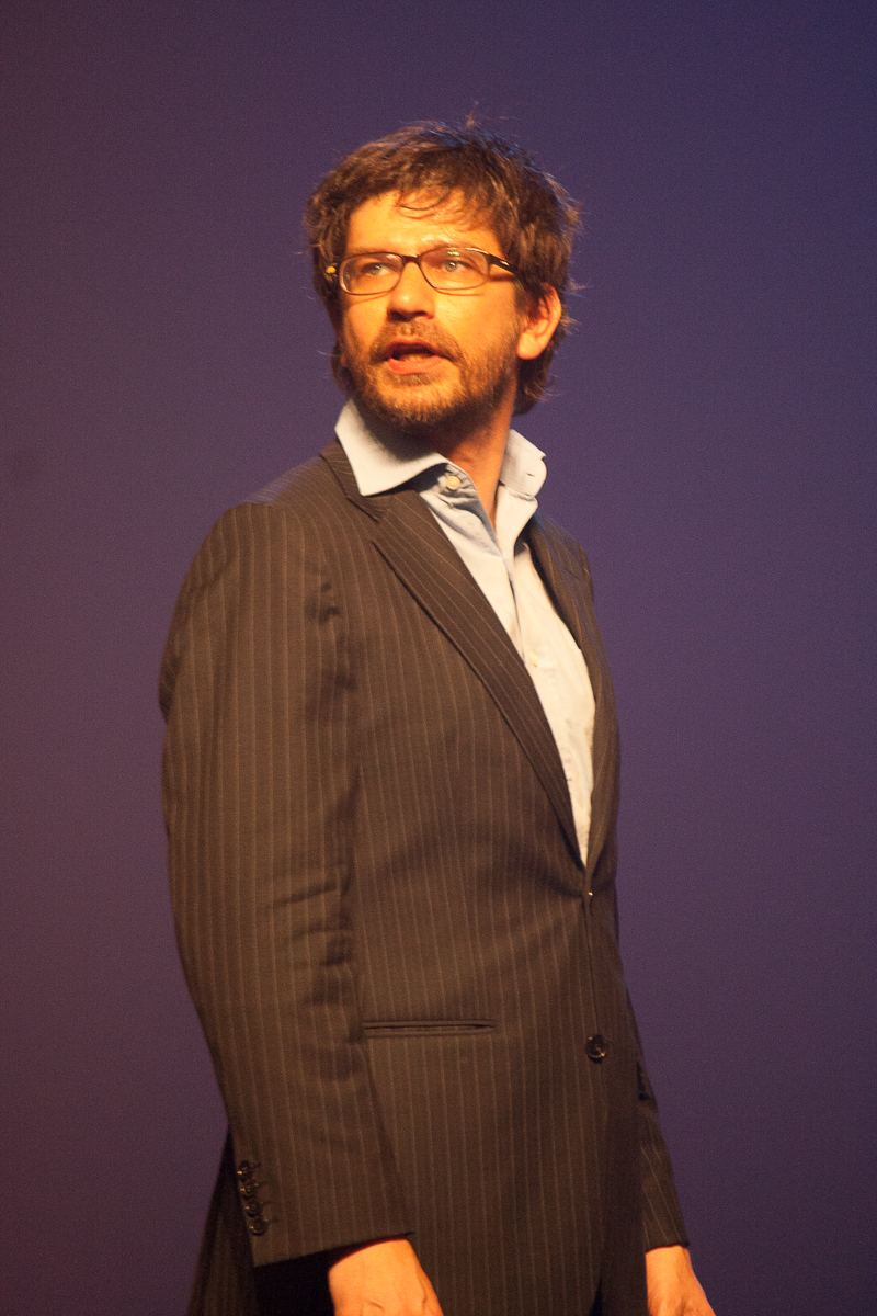 Wim Helsen - Het uur van de prutser